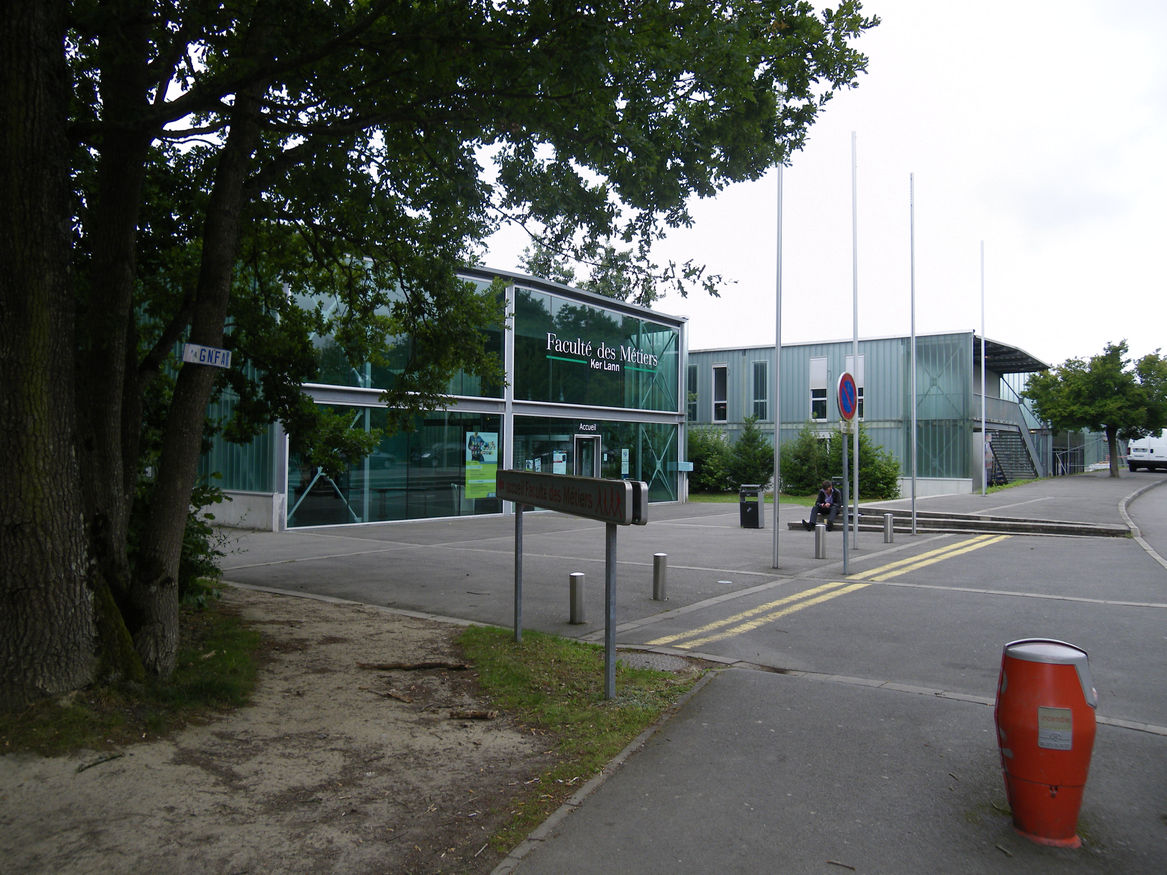 la faculté des metiers a ker lann